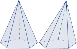 La pirámide es recta cuando el segmento que une la cúspide de ésta con el centro de la base (altura) forma un ángulo recto con la base.